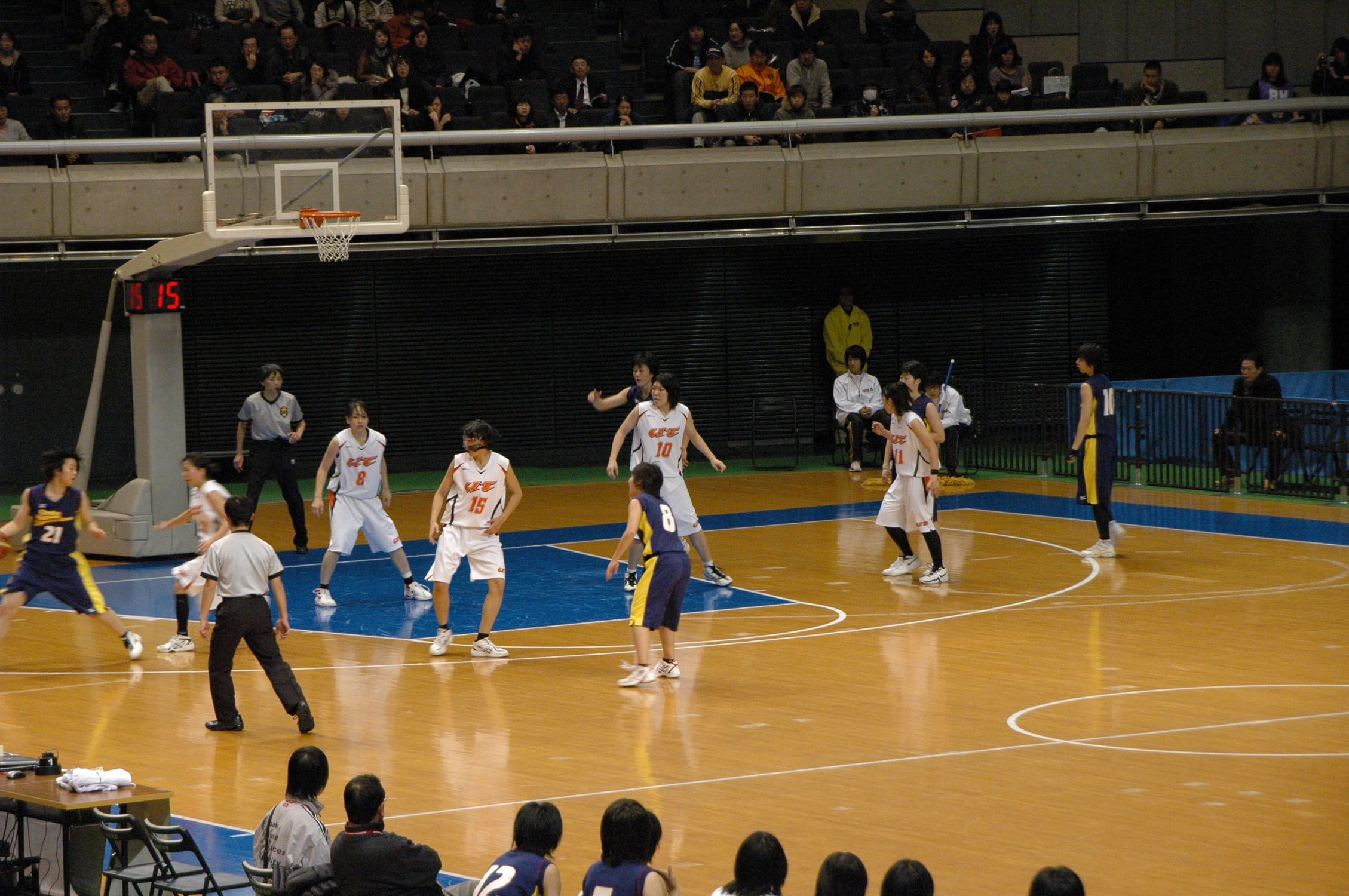 2011年全日本総合バスケットボール選手権大会2回戦、拓殖大学対大阪人間科学大学。東京体育館で。